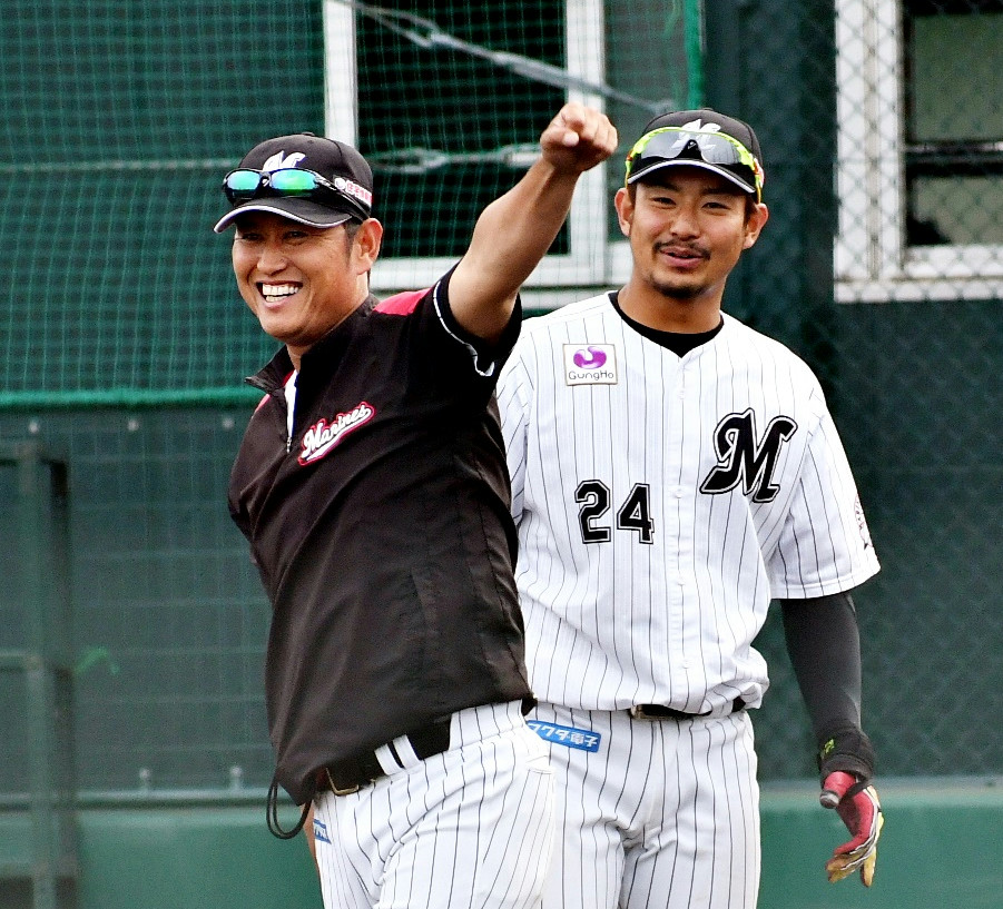 鶴岡一成コーチと吉田裕太捕手